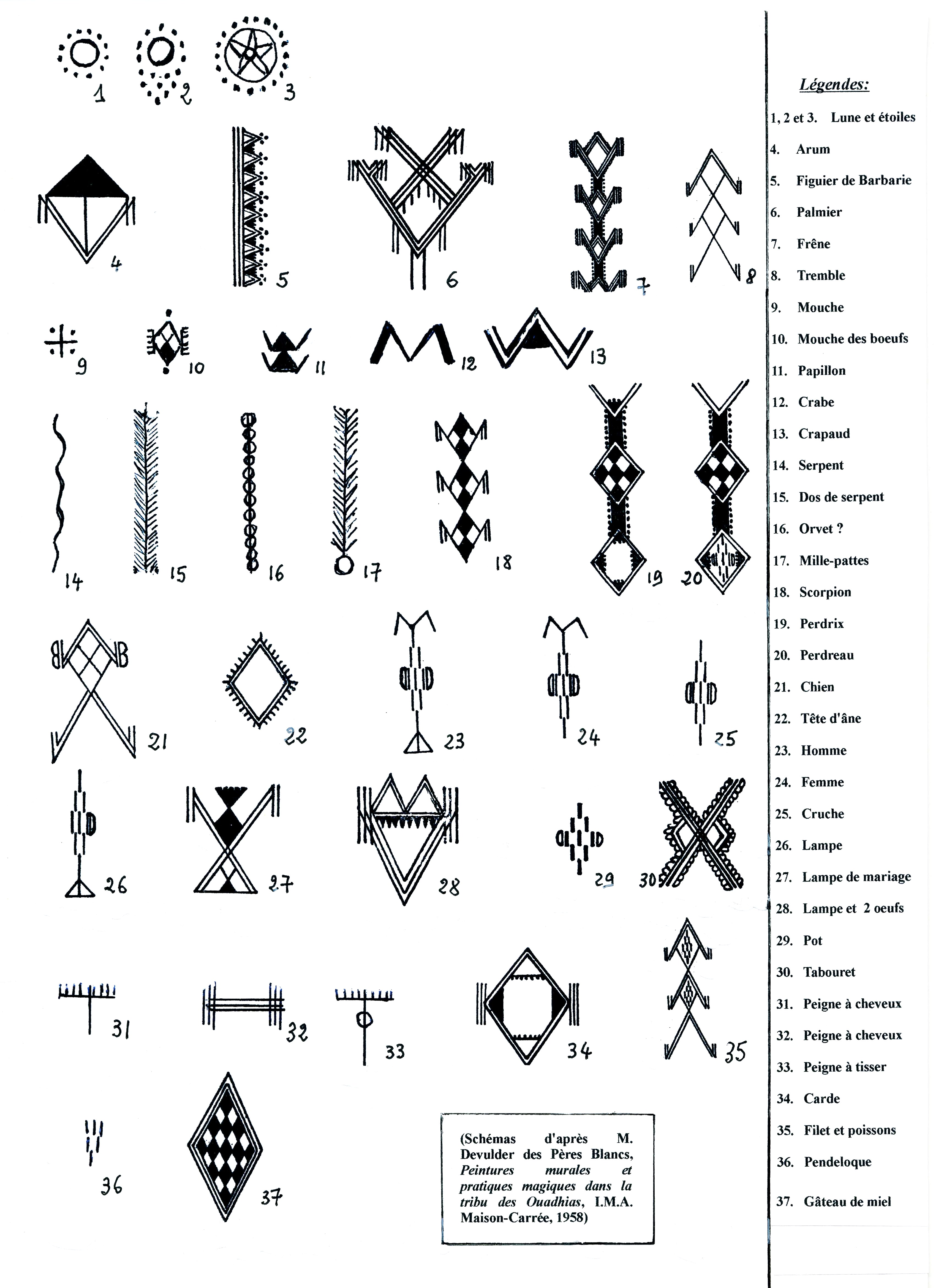 Signes des décorations murales de Kabylie, Algérie